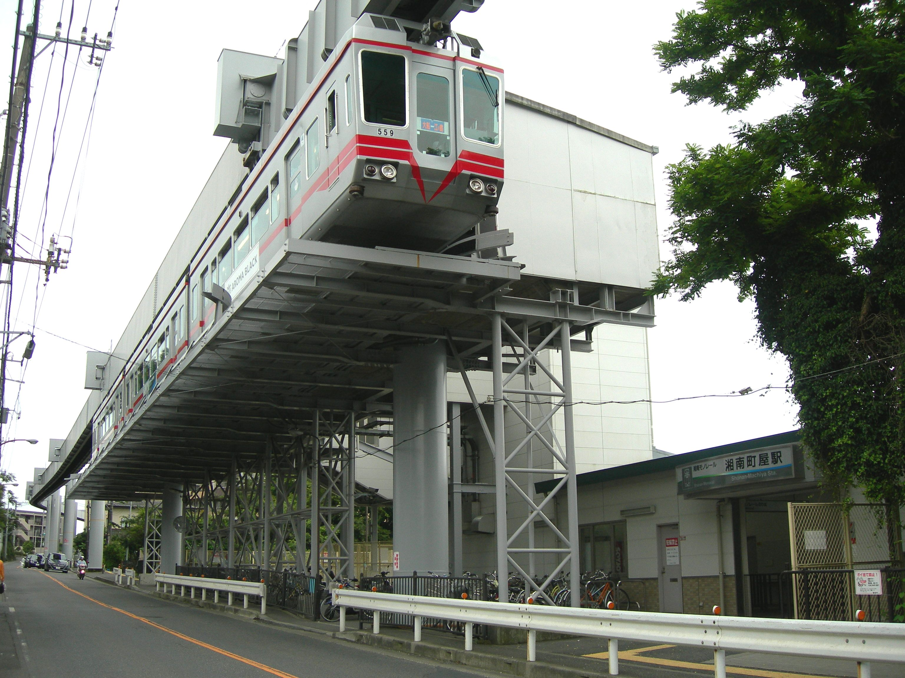 湘南町屋駅